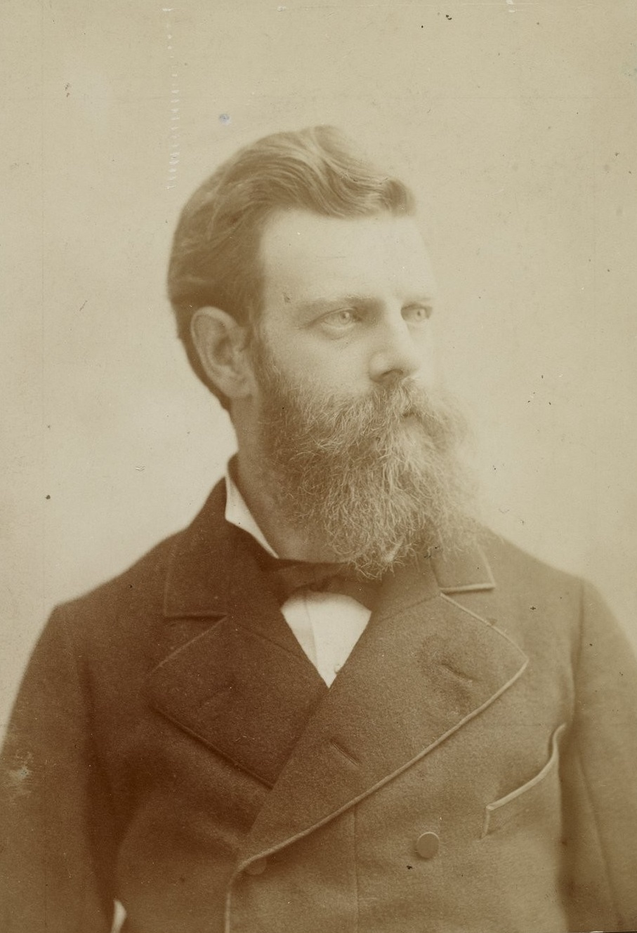 Franz Schrader (géographe) par Eugène Pirou